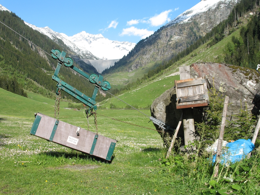 Materialseilbahn im Zillergrund, Zillertal, Tirol.